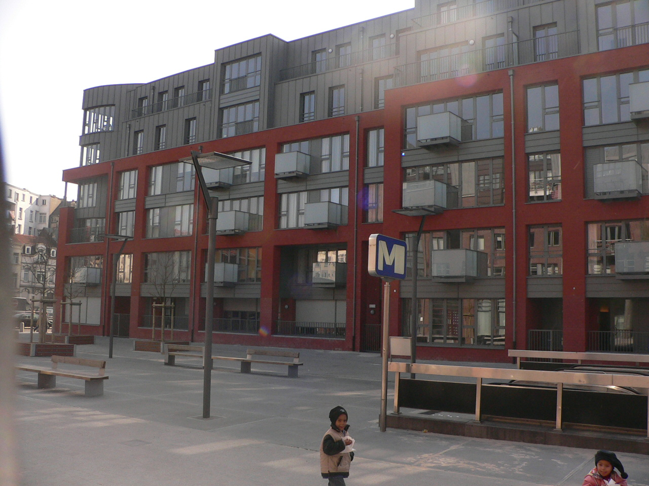 Station Comte de Flandre, Molenbeek.